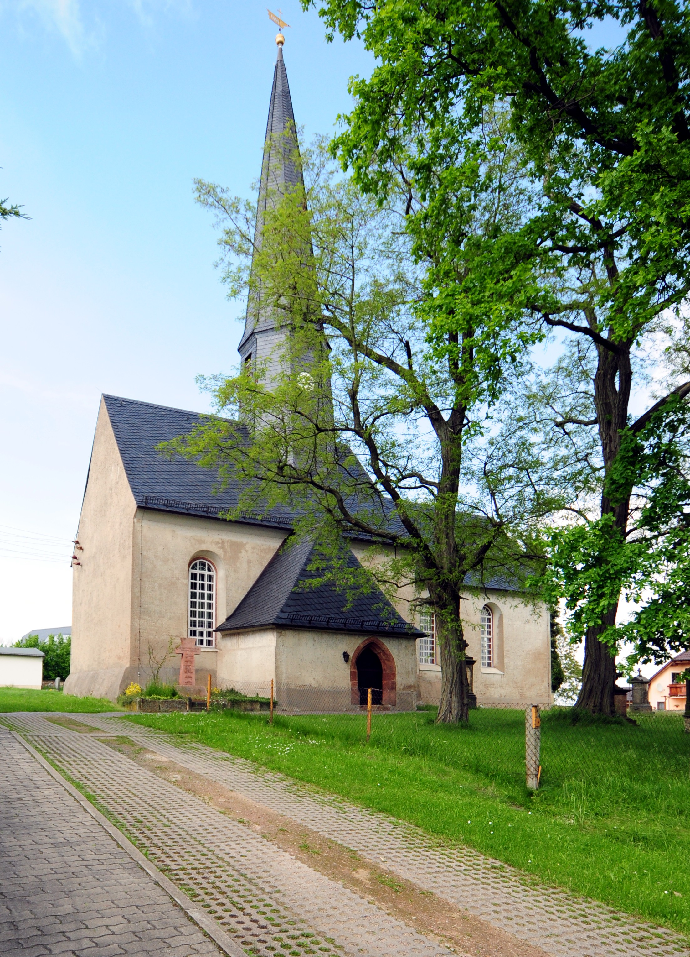 Ev. Pfarrkirche in Tanneberg, romanischer Kern, gotischer Chor, Tanneberg ist heute Ortsteil von Mittweida (Sachsen, Deutschland)